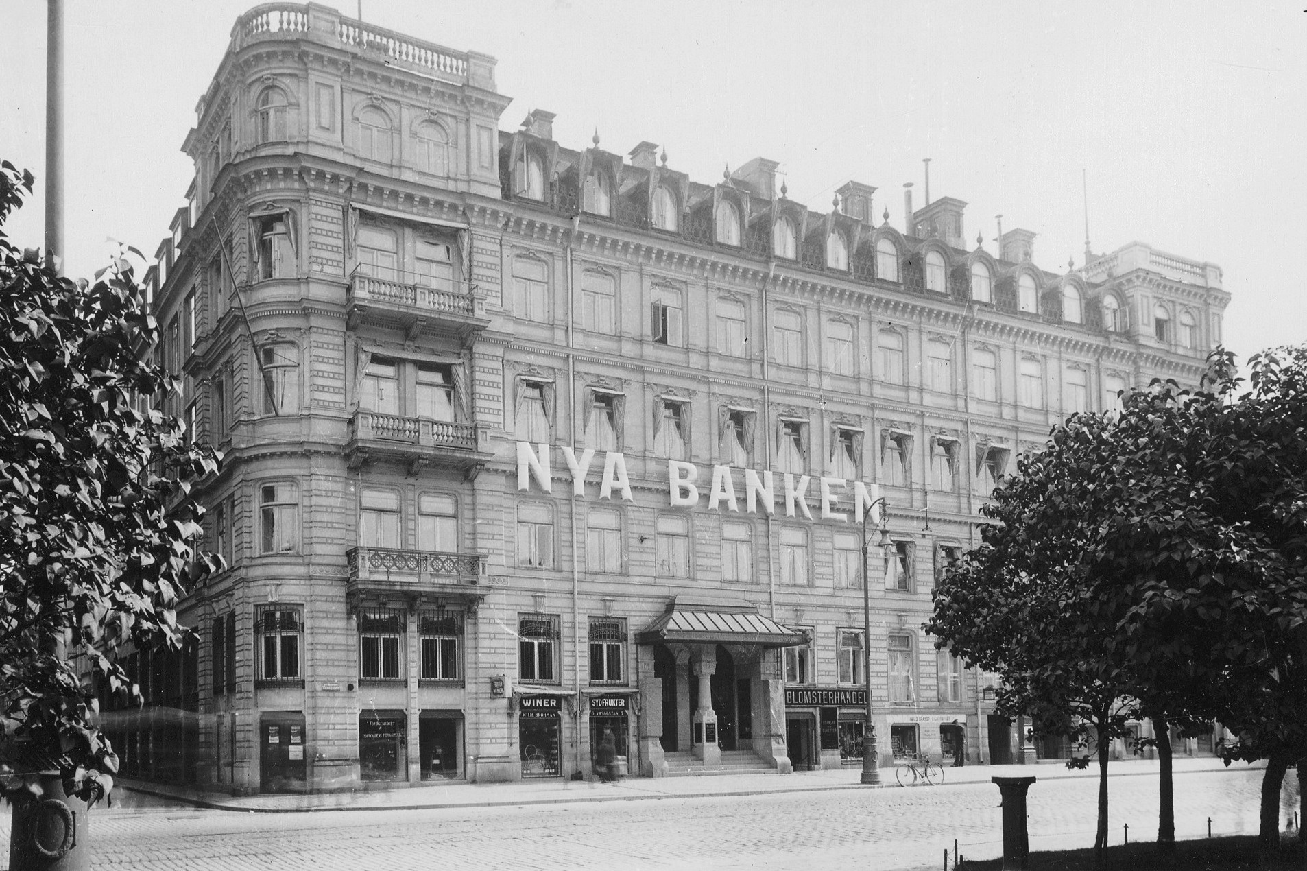 Nya Banken i kvarteret Snäckan